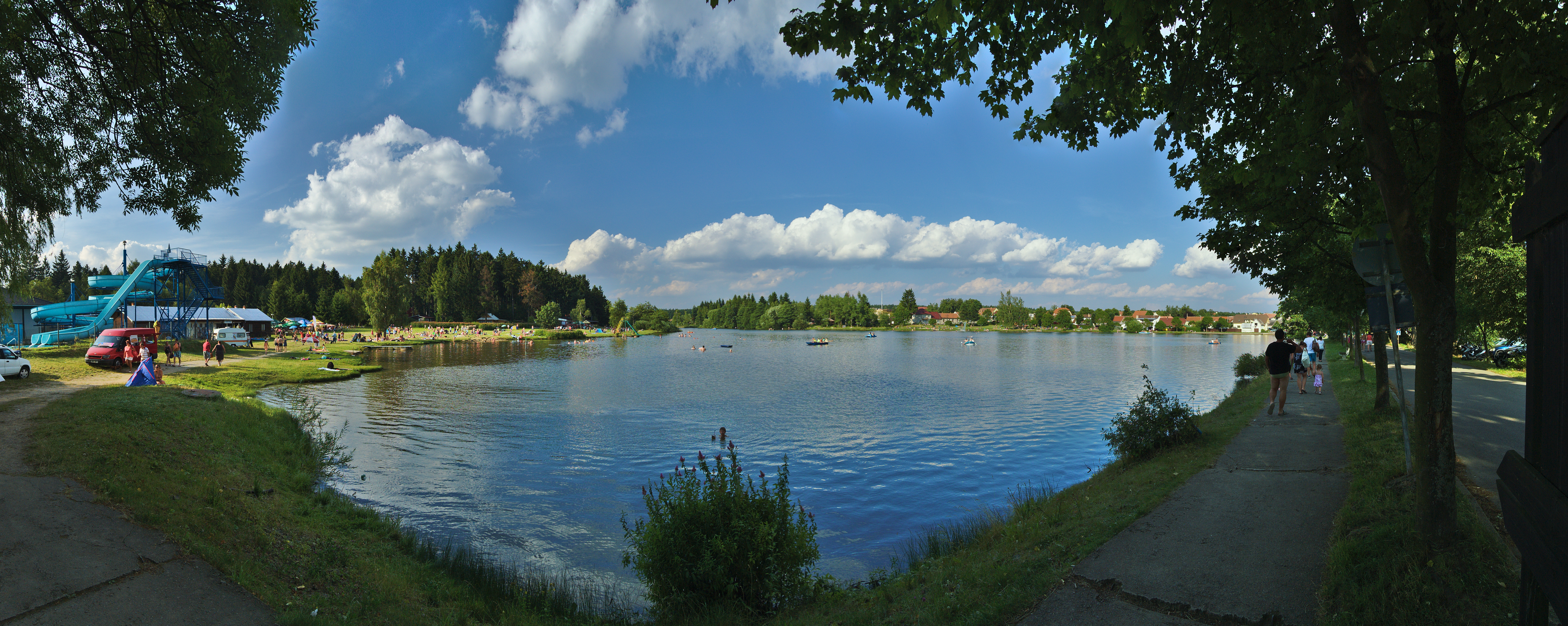 Panoramatický pohled na Sušský rybník z hráze od toboganu, Suchý, okres Blansko